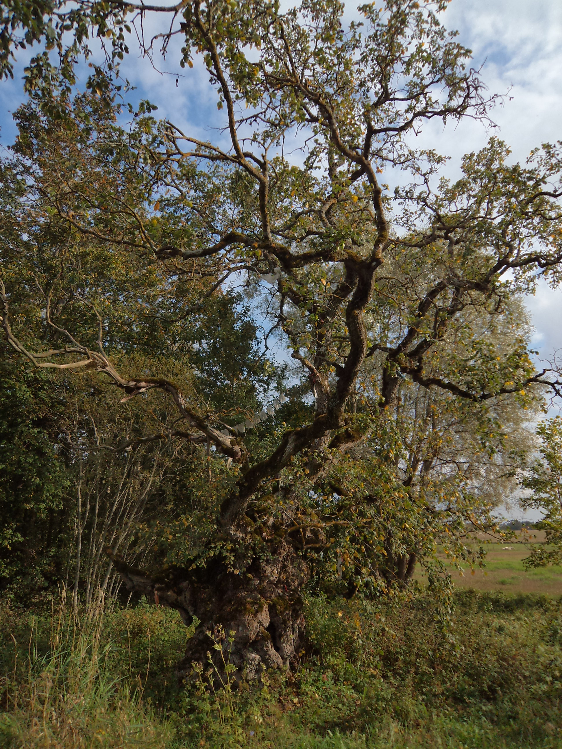 Hiiekünnapuu